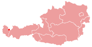 Karte von Österreich mit einer Kennzeichnung der Lage vom Kleinwalsertal. Das Bild wurde unter Verwendung der Vorlage Bild:Karte_oestereich.png von Benutzer:Jensens erstellt und unterliegt der GNU.